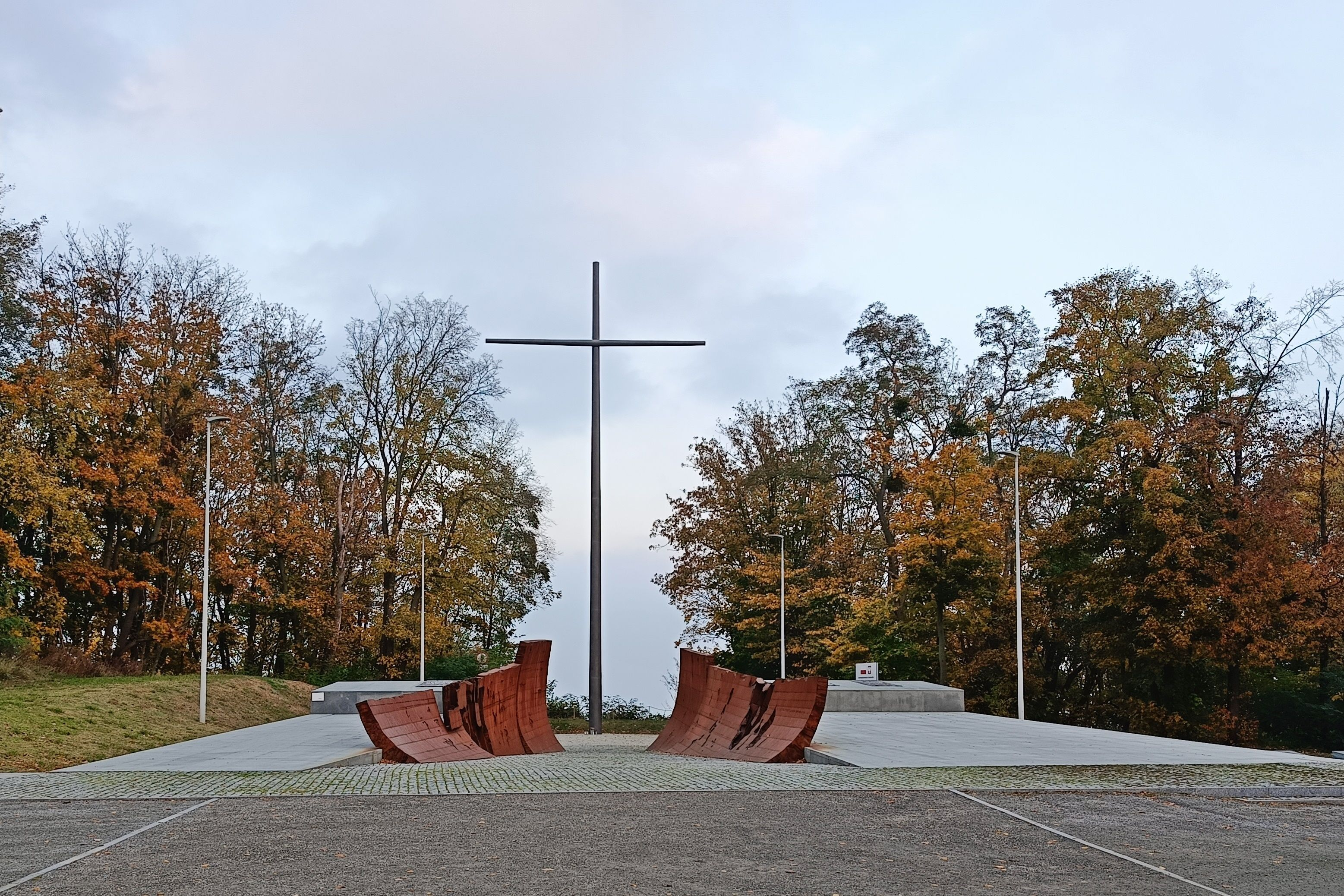 Cmentarz Marynarki Wojennej_Kwatera Pamięci_01